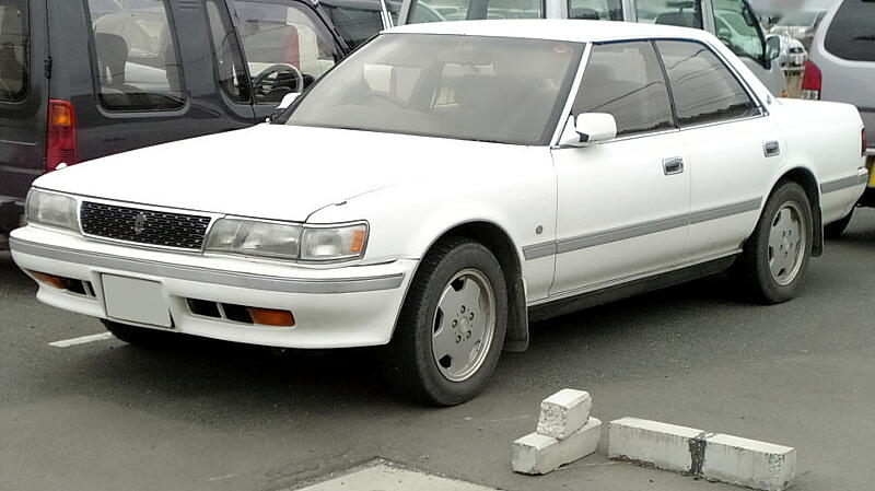 トヨタ・チェイサー（4代目・後期型）